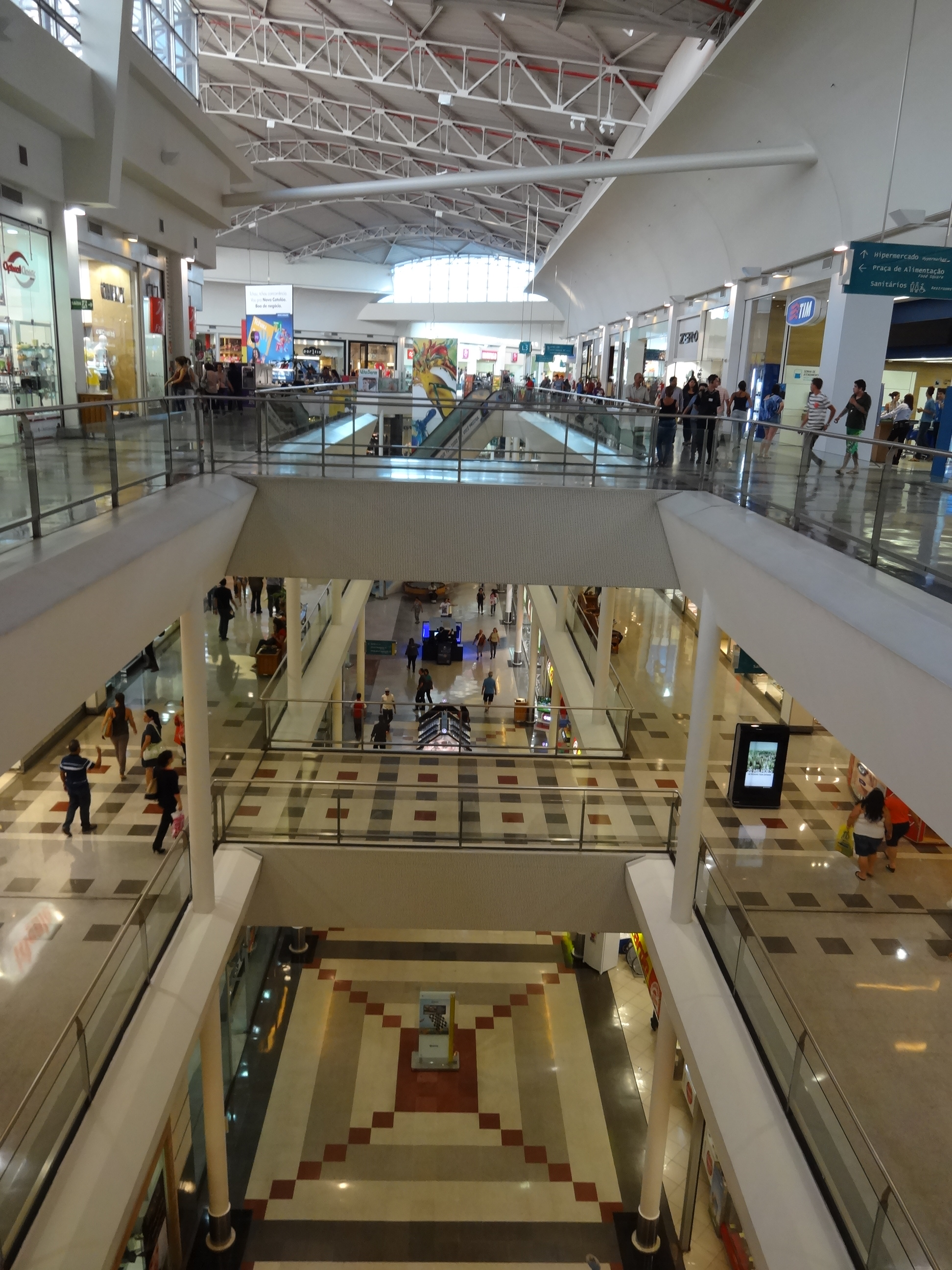 Shopping em Belo Horizonte.